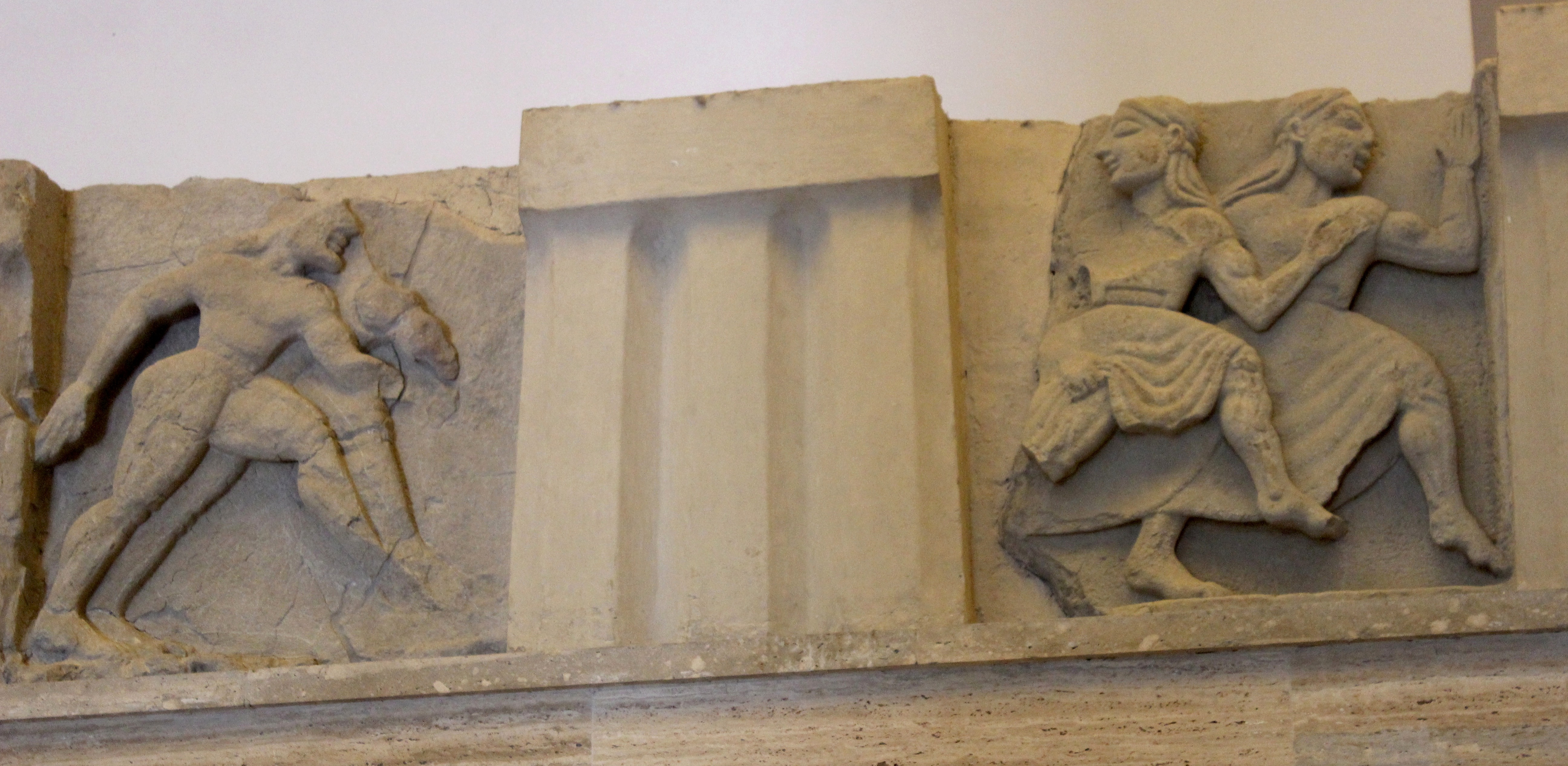 Paestum. Museo Archeologico Nazionale. Metopa del templo de Hera en la desembocadura del Sele.